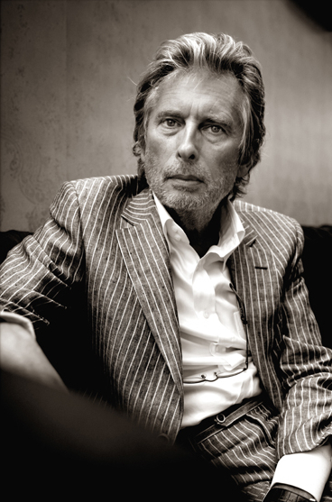 Vlaams journalist